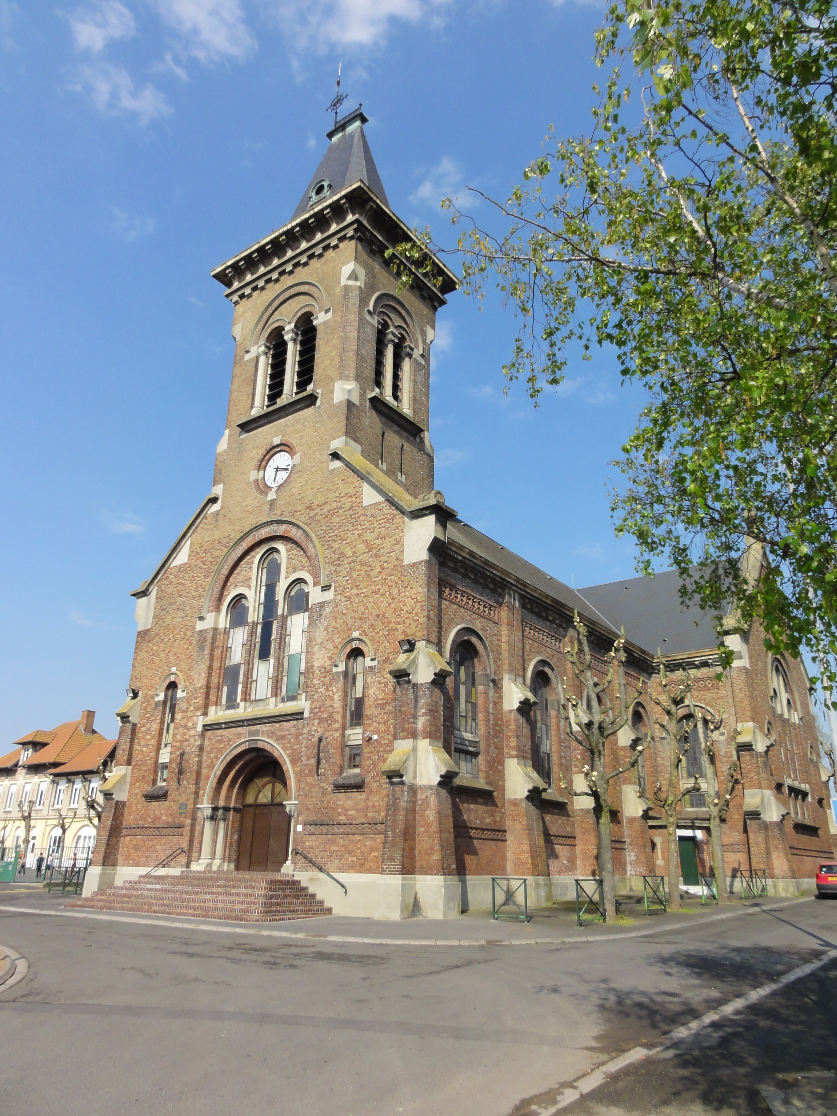 Église Saint-Amé et écoles de la Fosse n° 3 - 3 bis de la Compagnie des mines de Lens à Liévin, Pas-de-Calais, Nord-Pas-de-Calais, France.